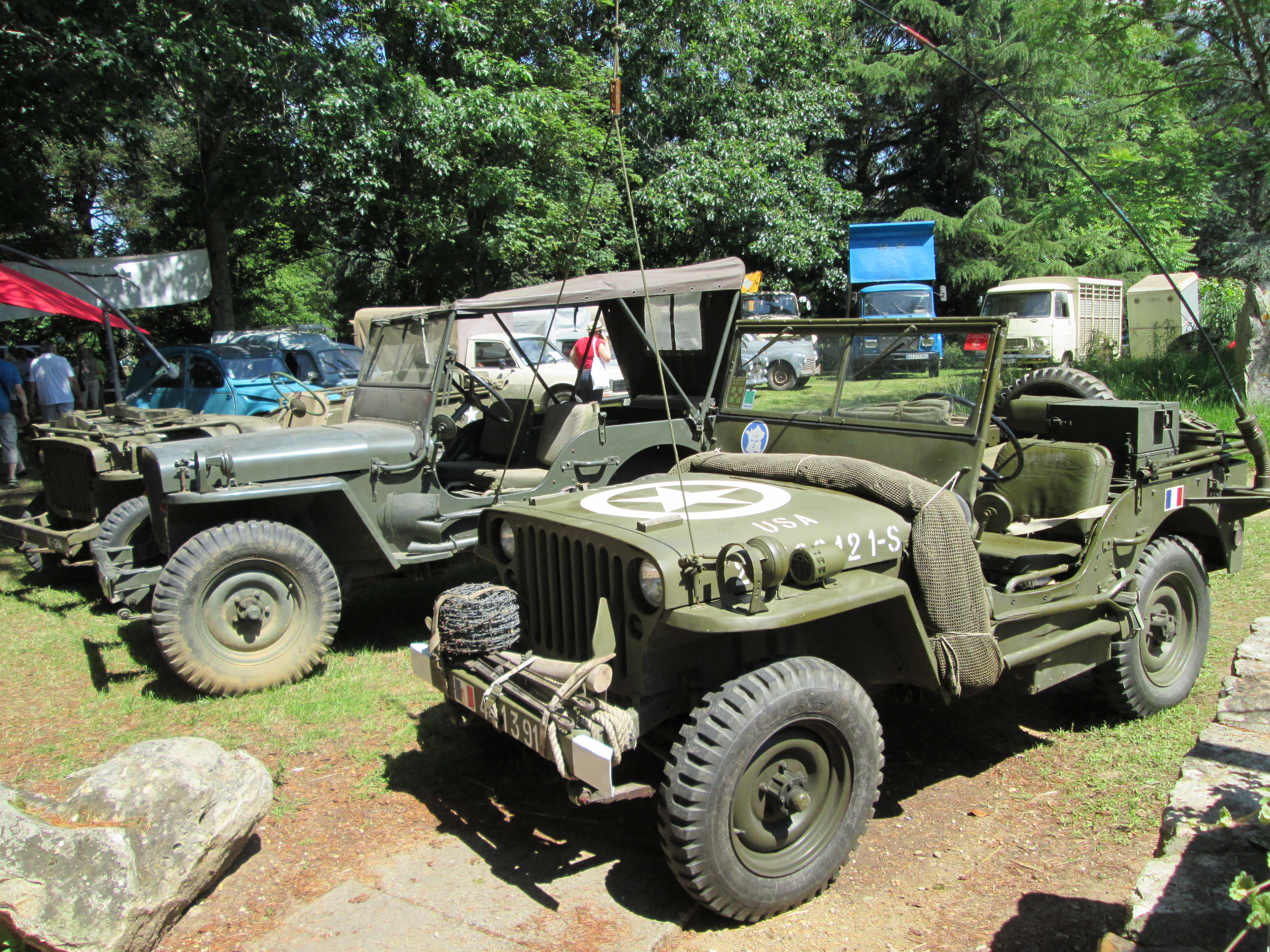 Hotchkiss M201.